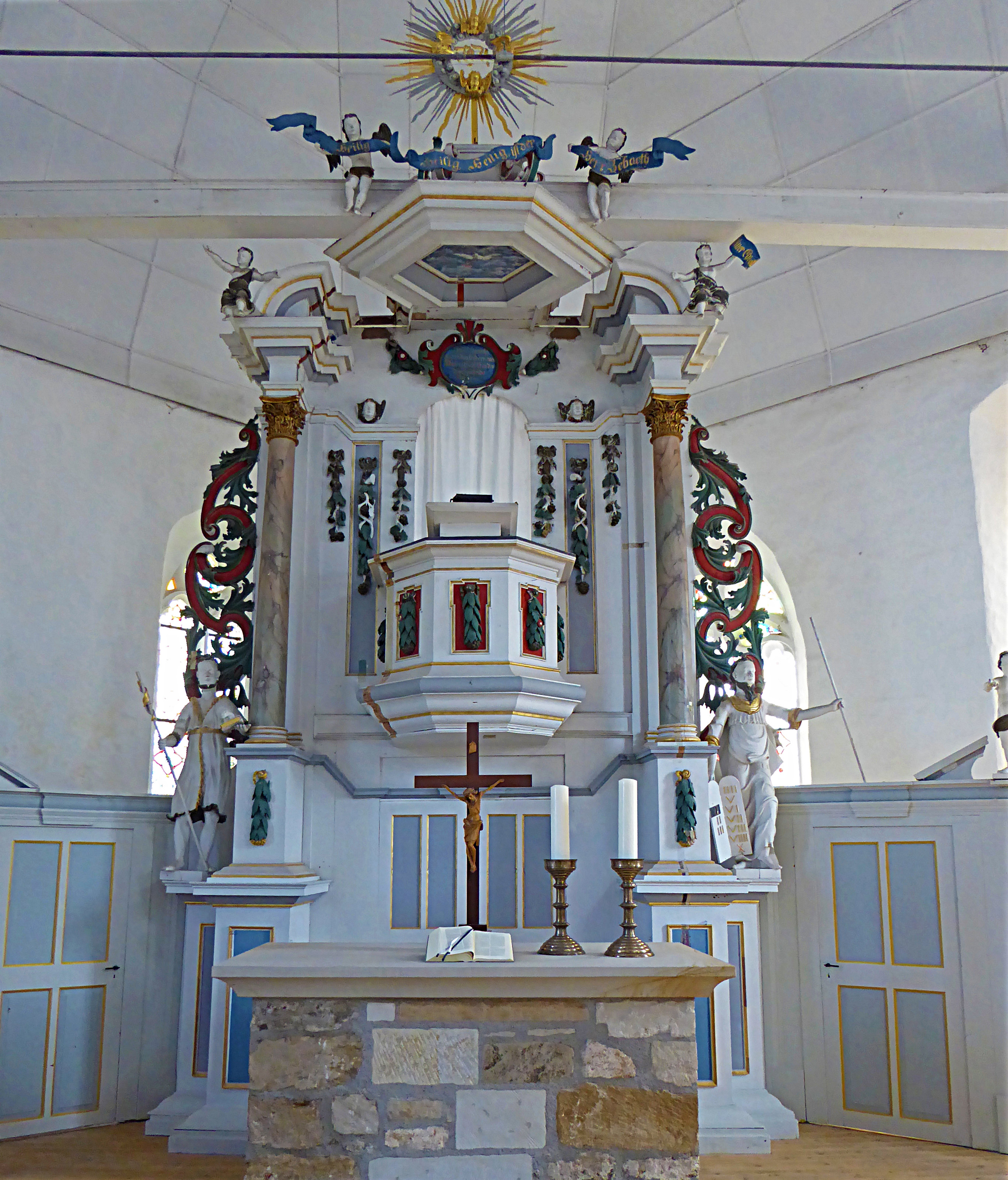 Kanzelaltar in St. Bonifatius (Kirchheilingen)